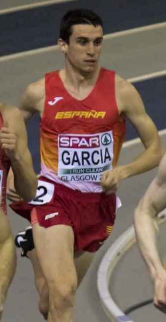 EKI30356 finale 800m man tuka english